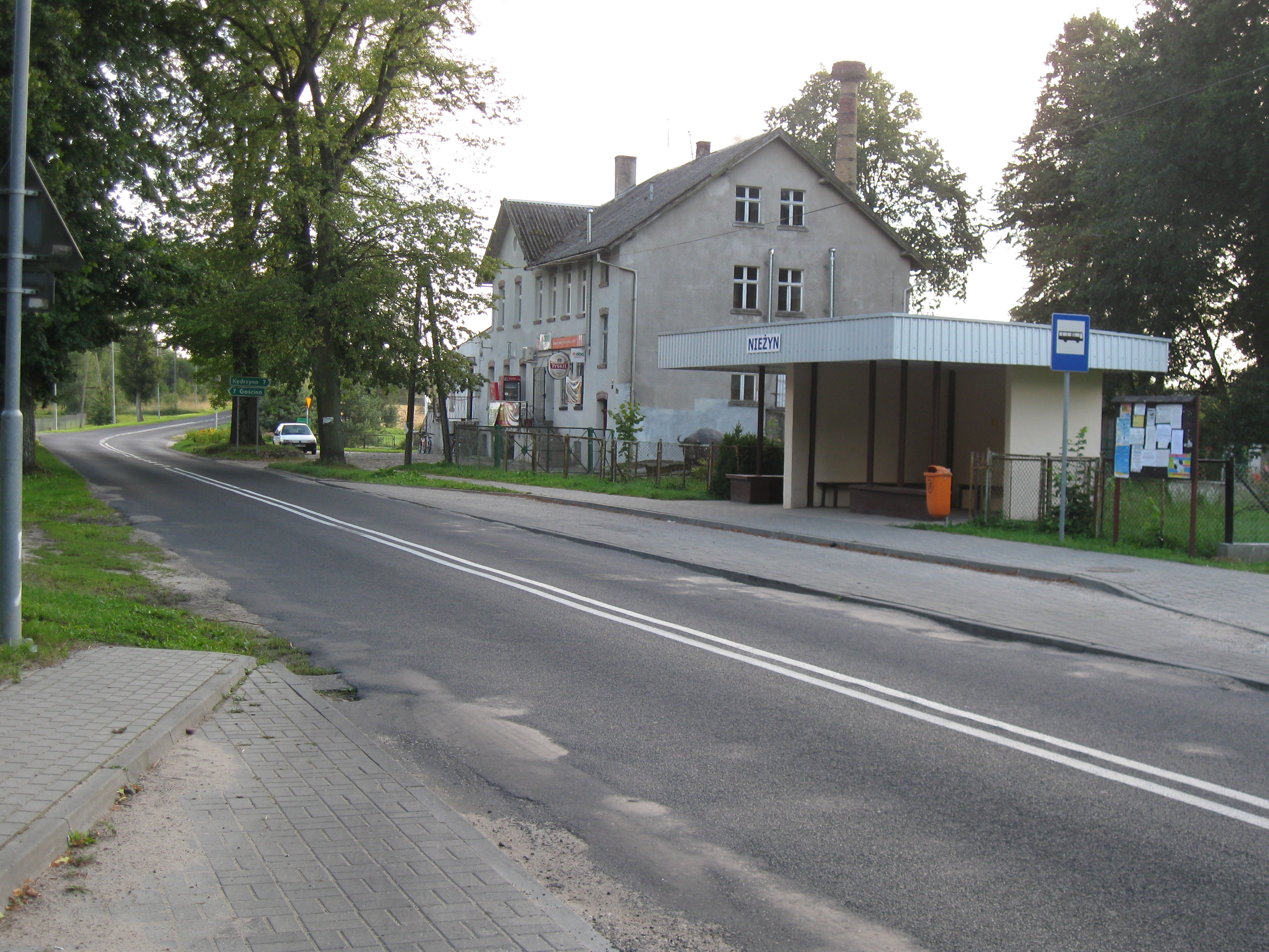 Centrum Nieżyna